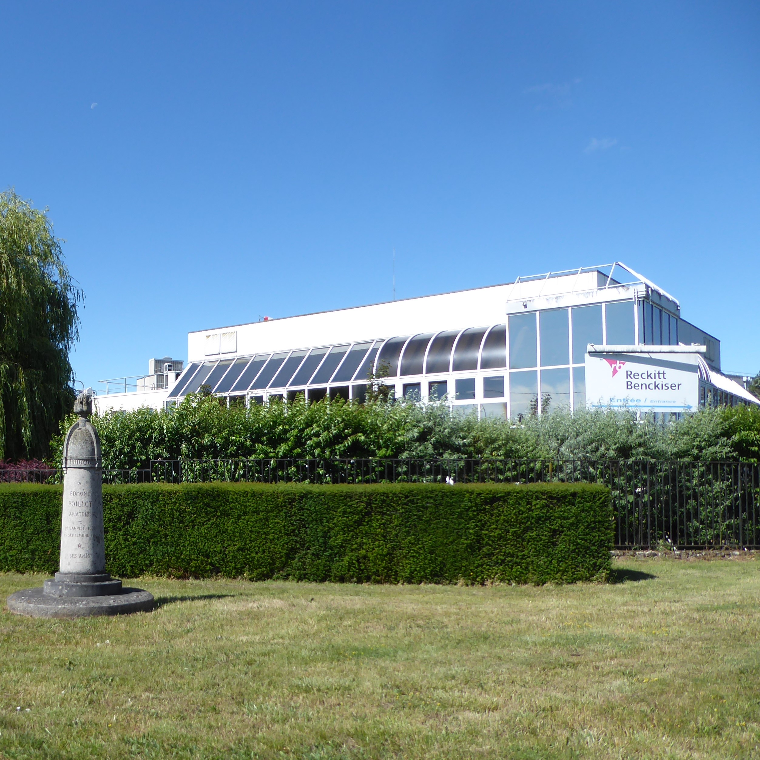 Usine de fabrication française du groupe, 102 route de Sours, Chartres, Eure-et-Loir, France.